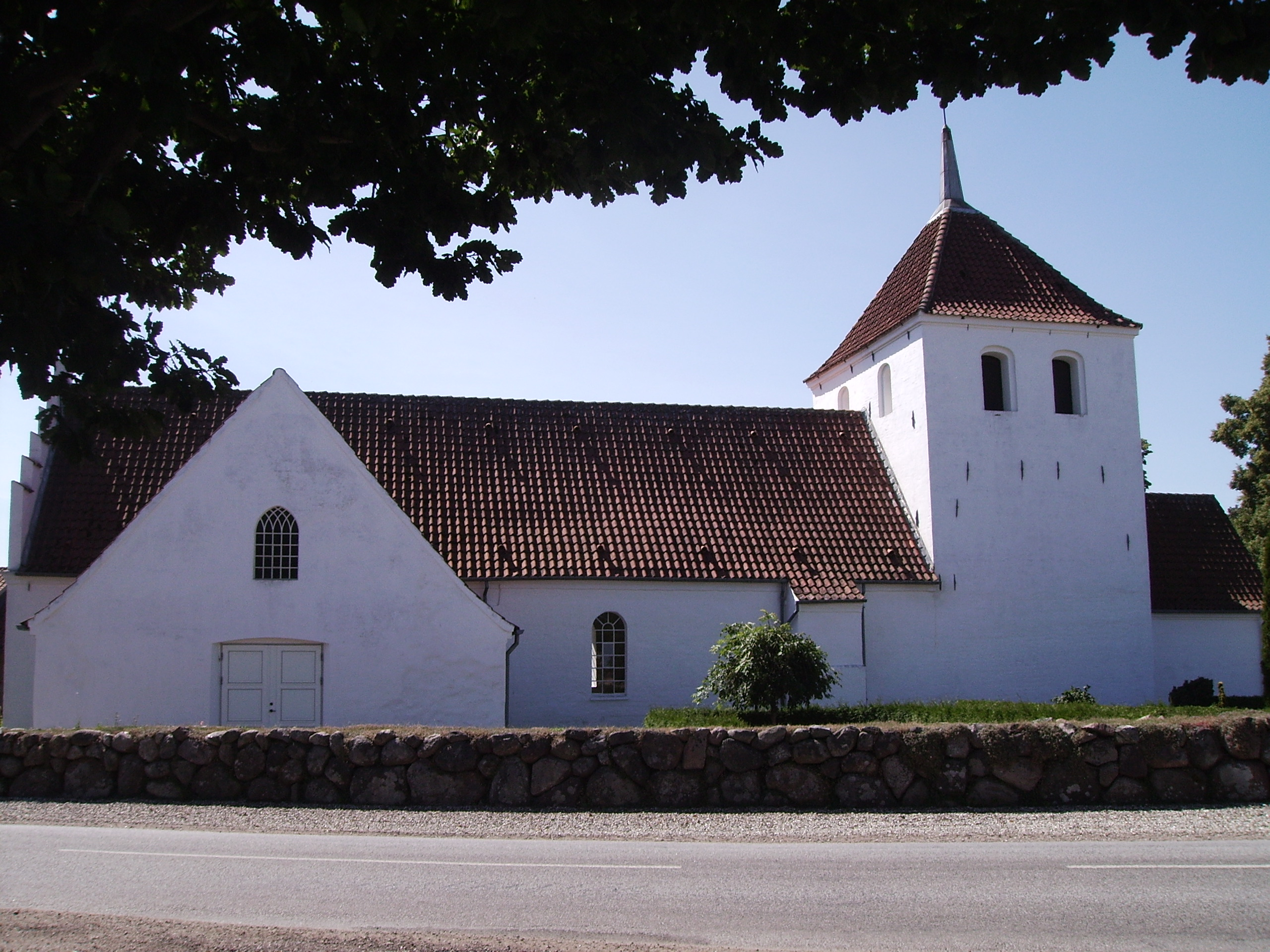 Østrup Kirke, Østrup Sogn, Lunde Herred, Odense Amt, Denmark (Danish Church) - Østrup Kirke fra nord